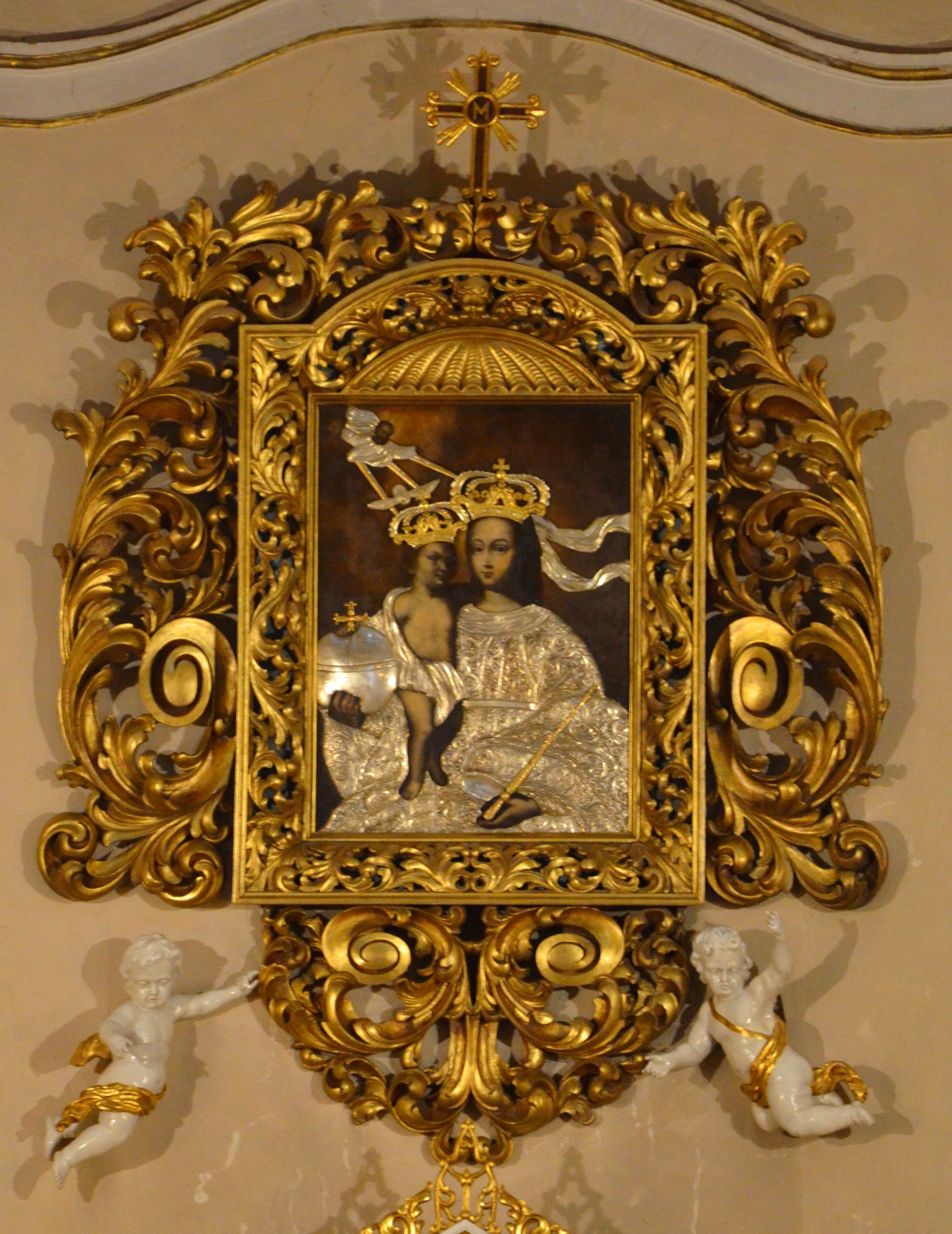 Parkowo, kościół par. p.w. św. Małgorzaty, 1781-1802